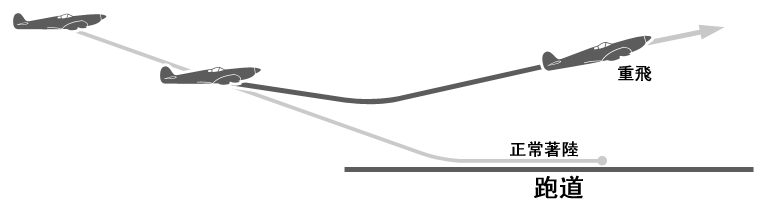 重飛示意圖（繁體中文）